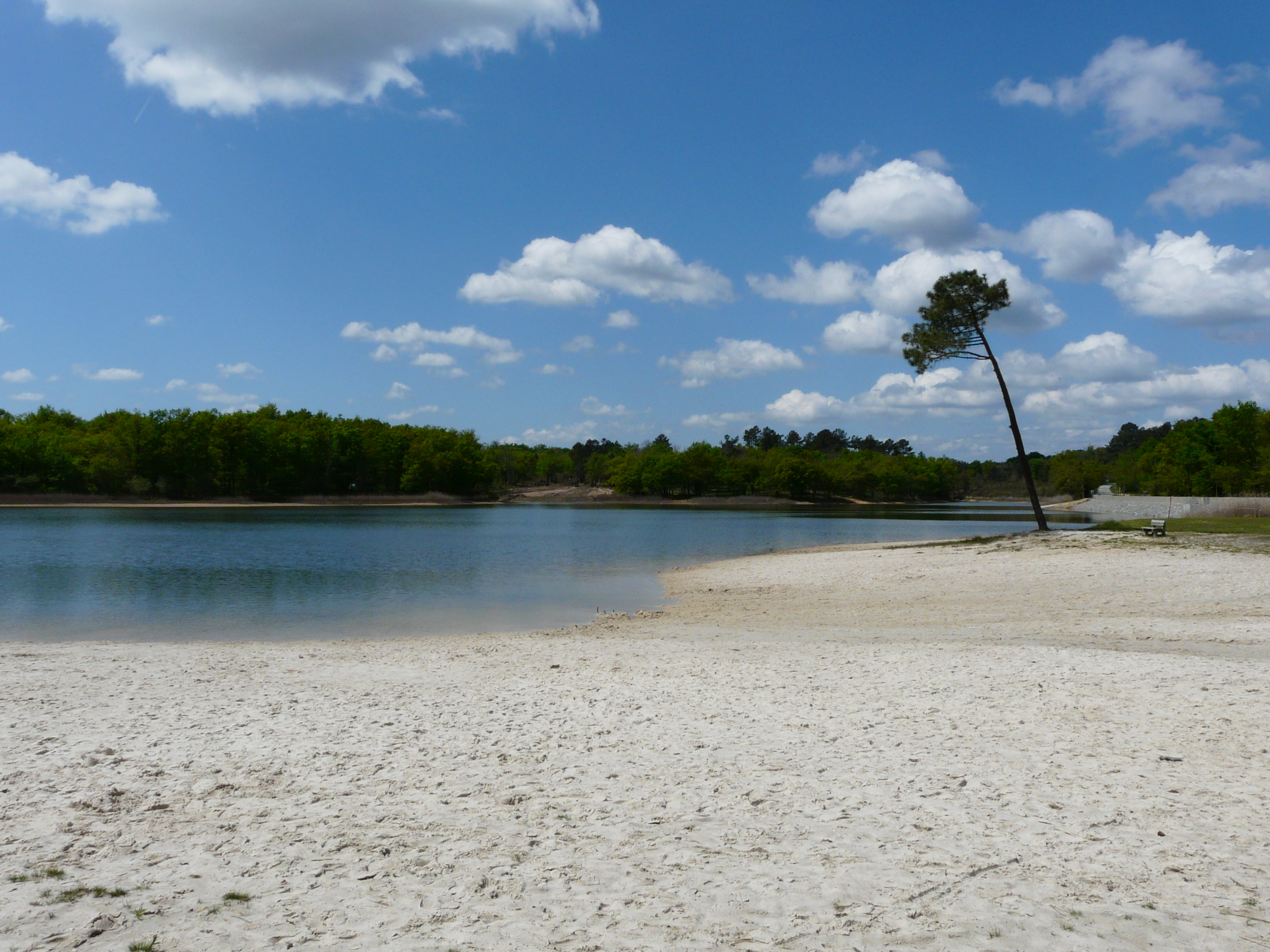 Le grand étang de La Jemaye, Dordogne, France